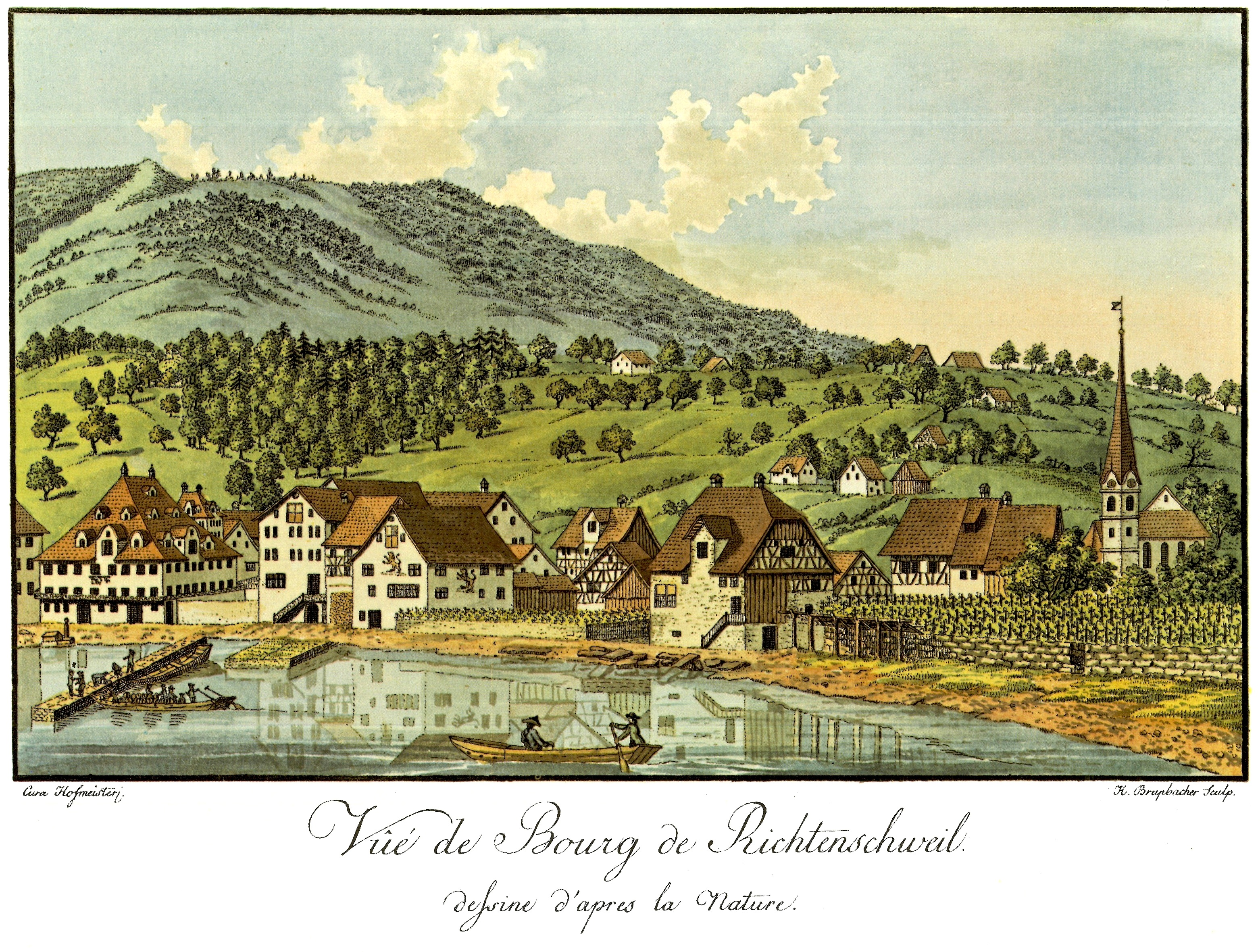 Stich von Heinrich Brupbacher (1758–1835) Richterswil